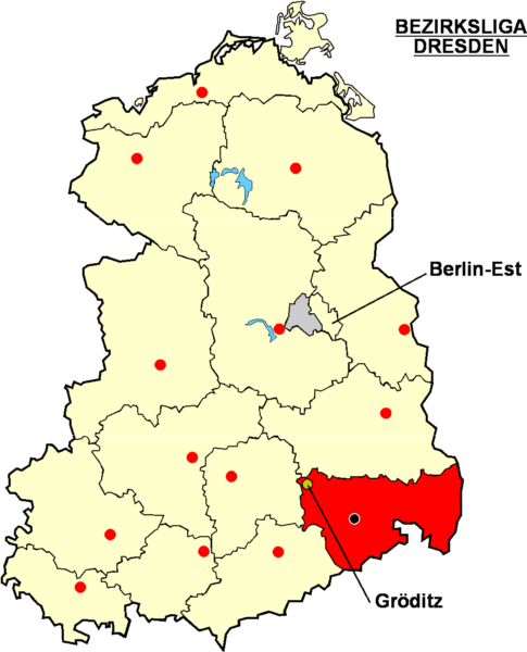 Localisation de Gröditz dans la "Bezirksliga Dresden" Catégorie:Logo de clubs de football - Allemagne